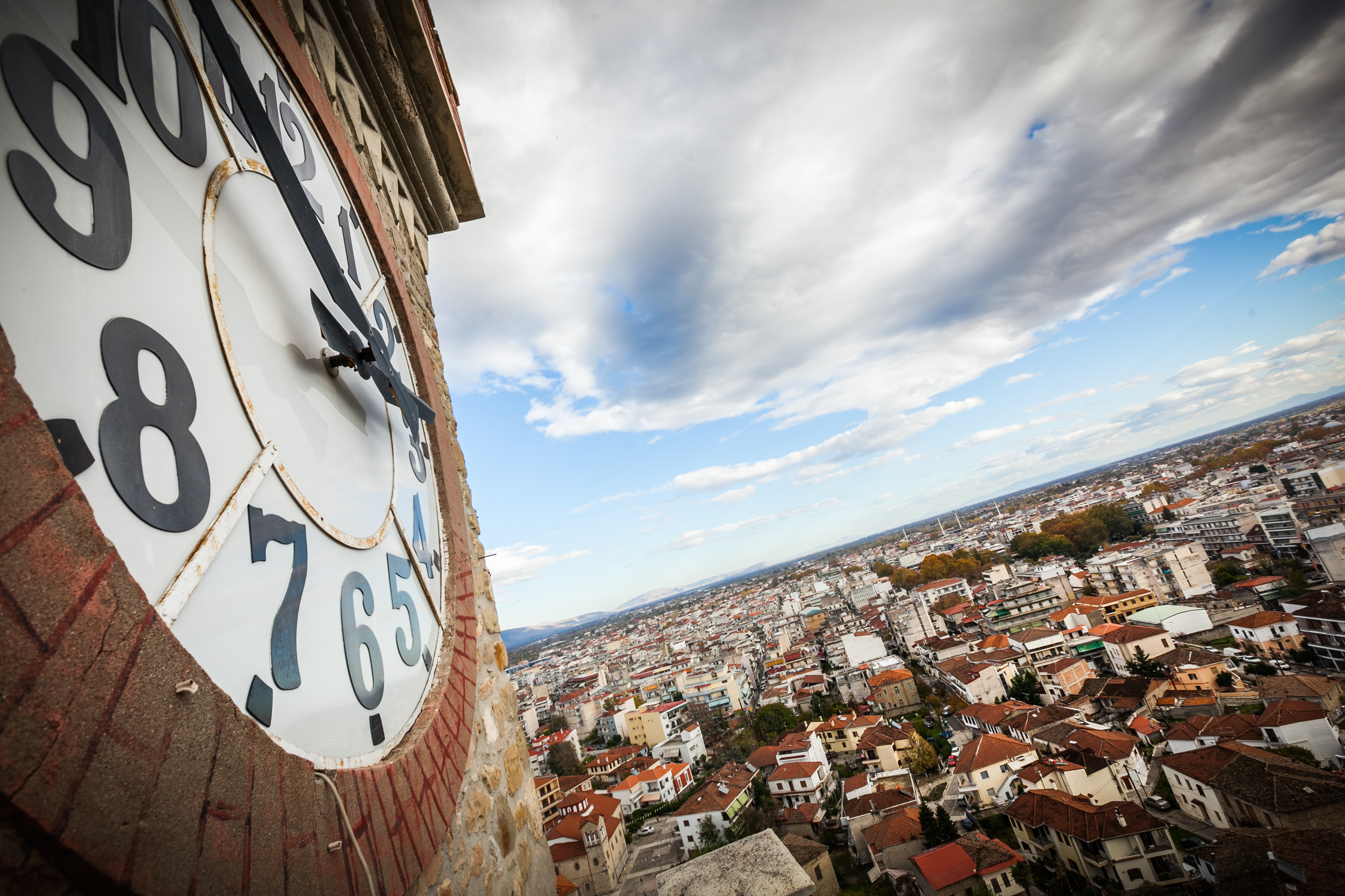 Αποψη της πόλης από το ρολόι